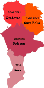 Prizrenski upravni okrug (Prizren administrative district).